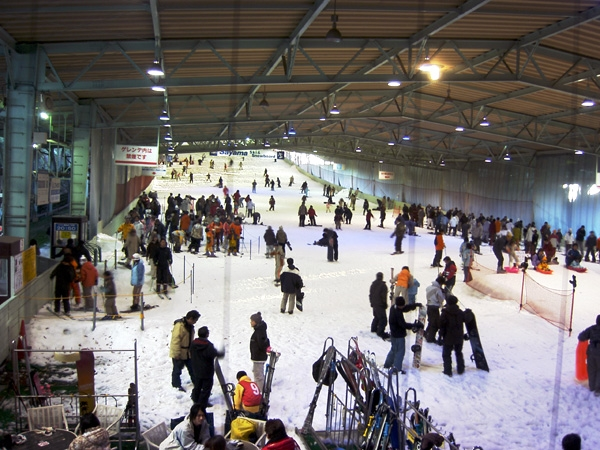 Sayama Ski Resort, Tokorozawa.